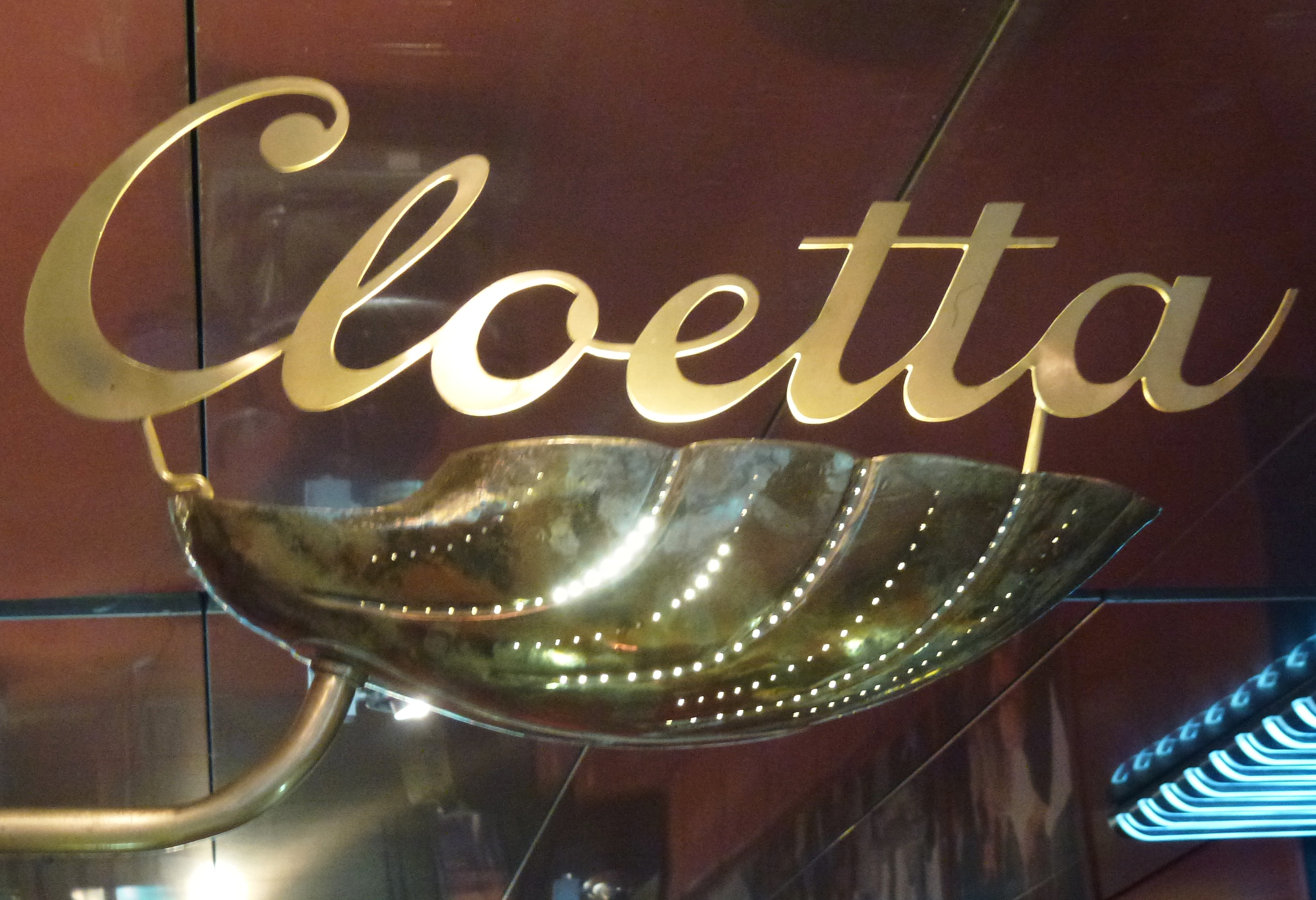 Cloetta-lampa på Filmhuset